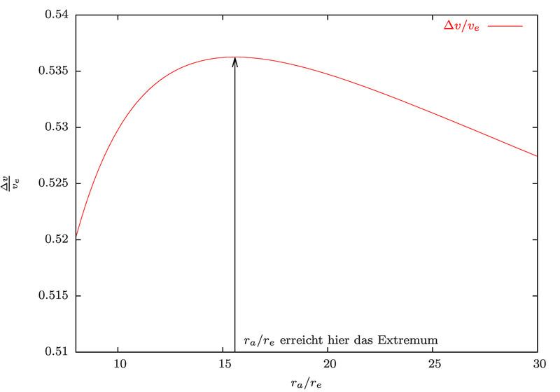 Für den Hohmann-Transfer muss bei einem gewissen Verhältnis von Ausgangs- und Zielorbit eine maximale Geschwindigkeitsänderung durchgeführt werden.